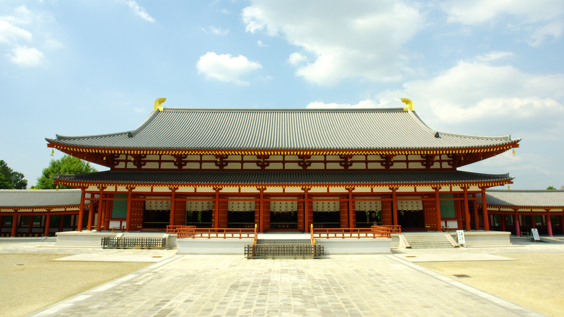 薬師寺大講堂全景。金堂より撮影。16:9にトリミング